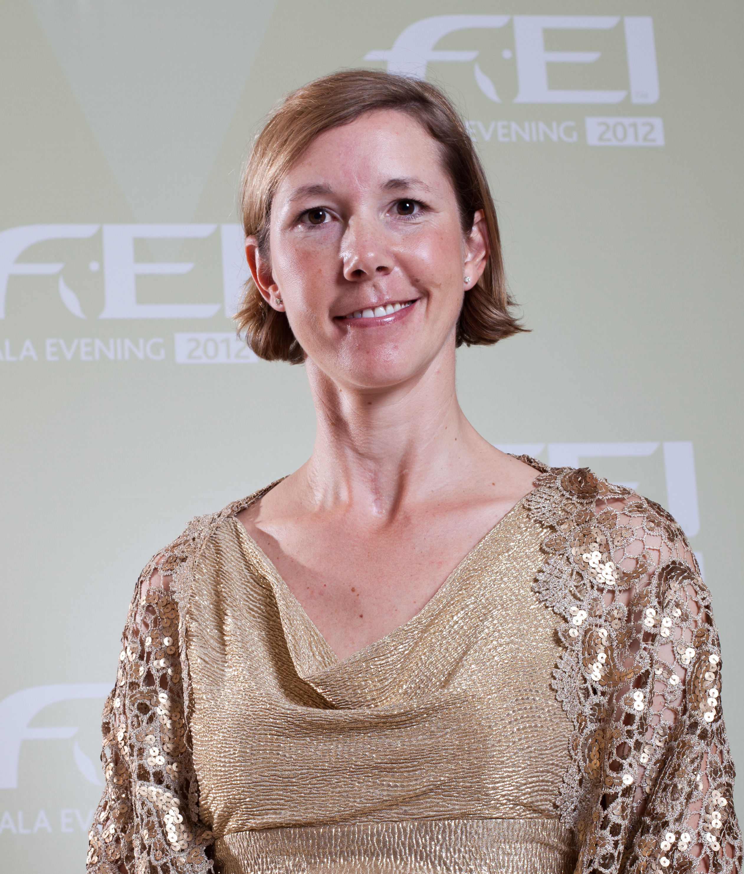 FEI Against all Odds Award Winner 2012